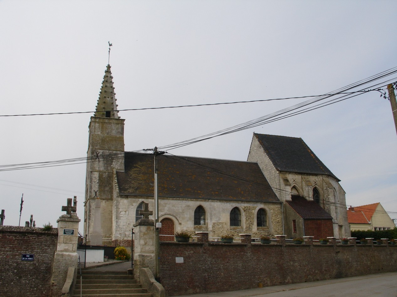 Église de Nort-Leulinghem